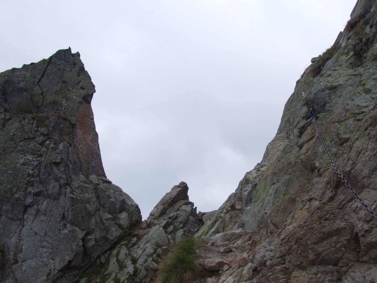 Przełecz Czerwona Ławka od strony Doliny Staroleśnej (słowackie Tatry Wysokie)